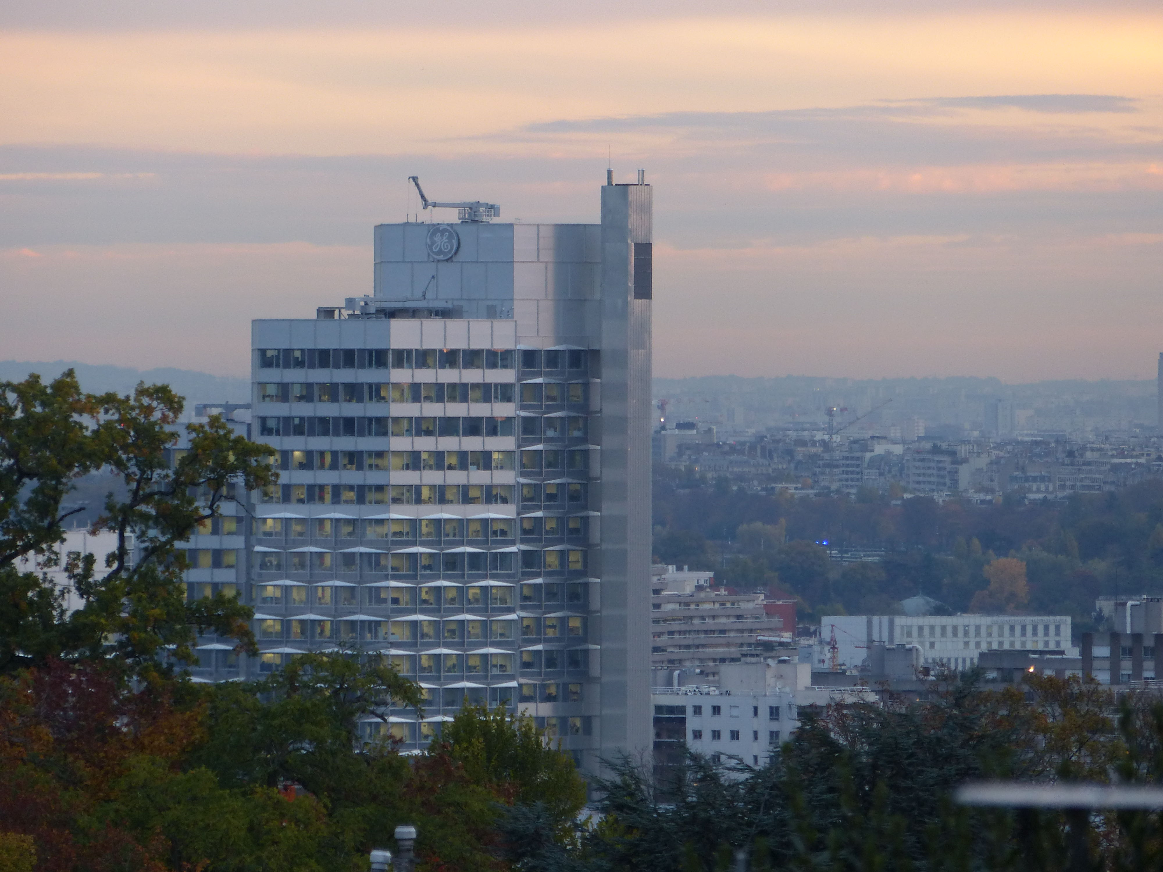 Les tours Citylights (anciennement tours du Pont de Sèvres), vues depuis le quartier de Bellevue à Meudon (Hauts-de-Seine, France)